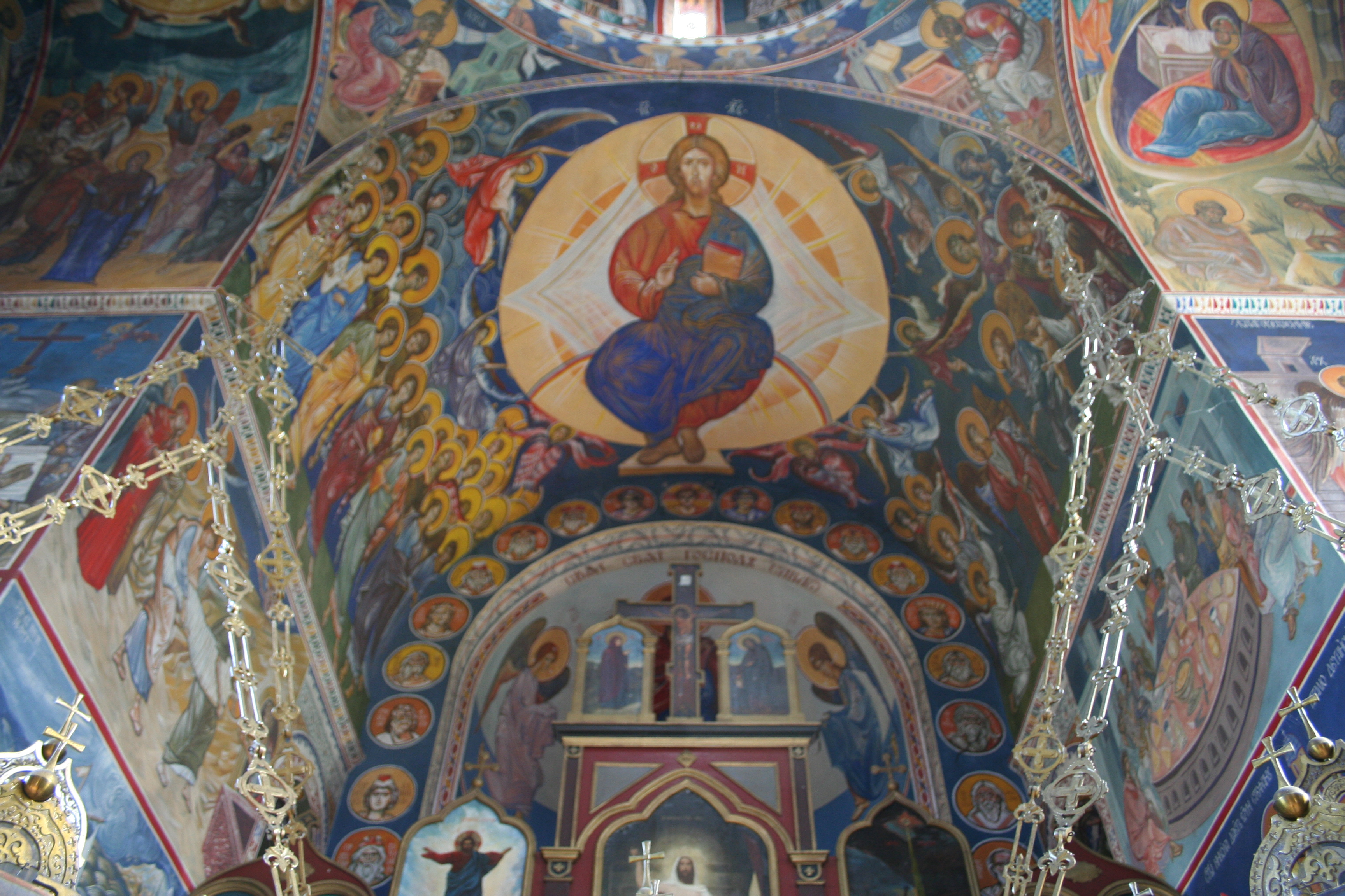 Manastir Grabovac